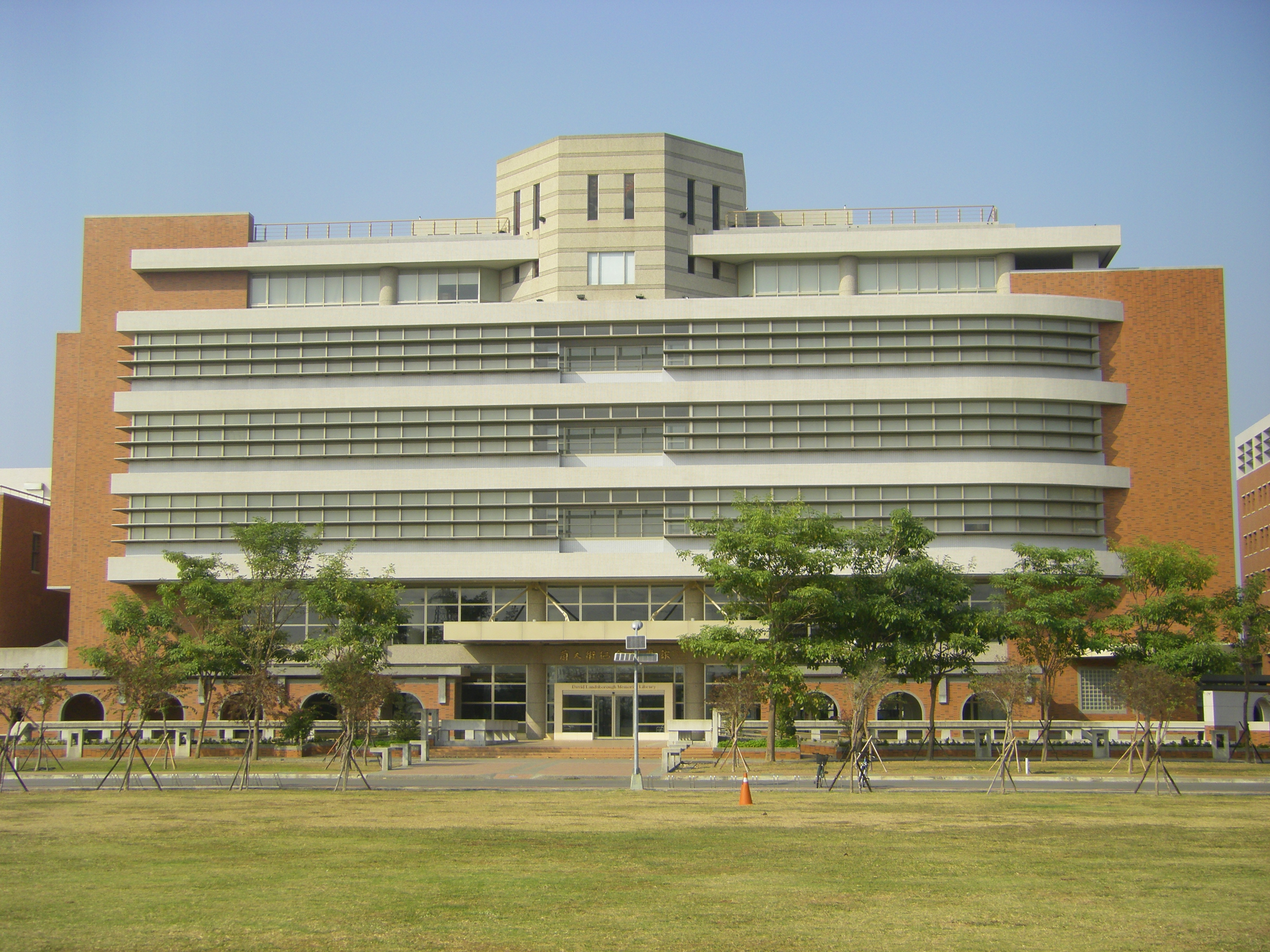 中文（台灣）: 長榮大學蘭大衛紀念圖書館